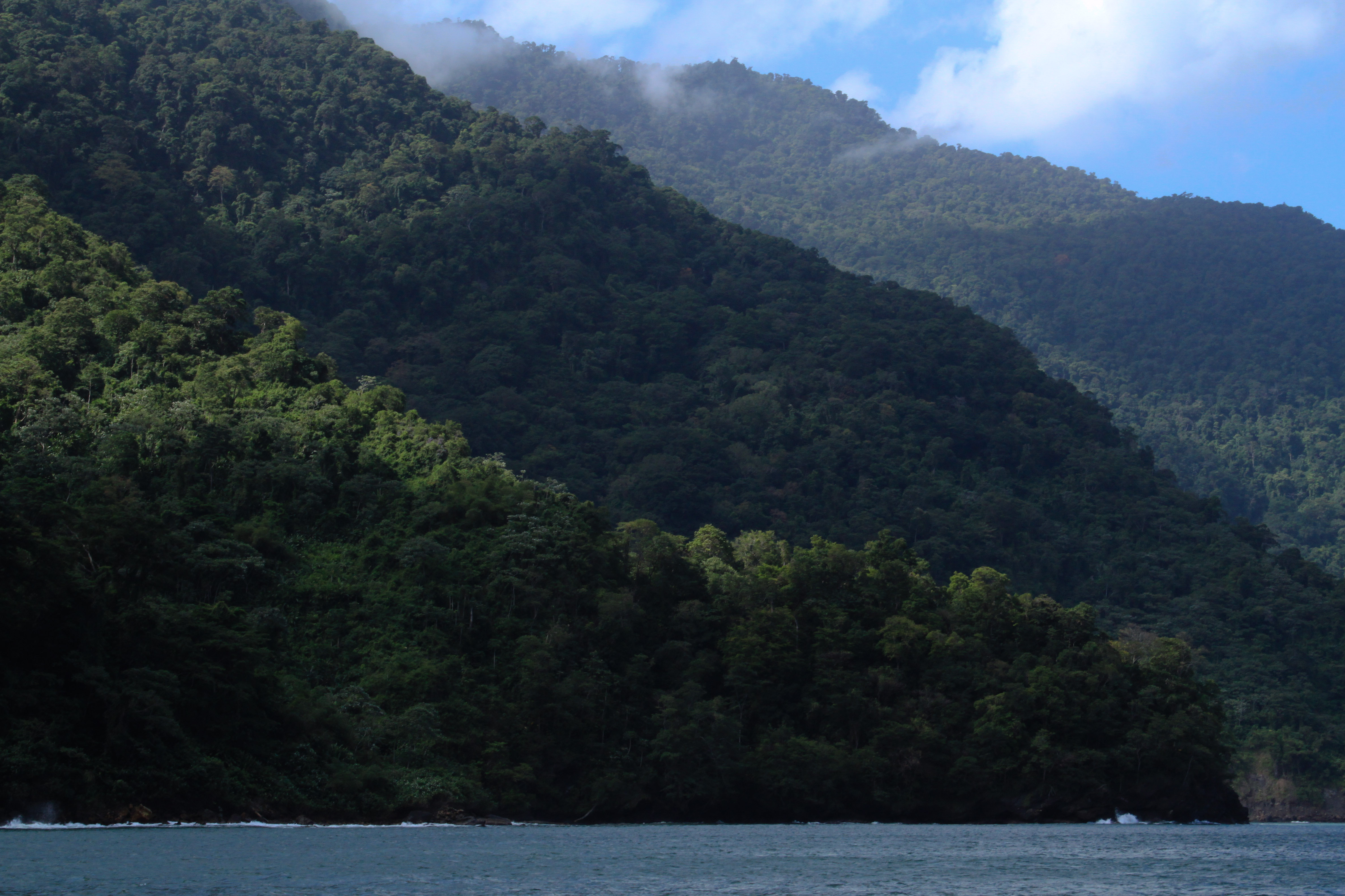 Península de Paria, Estado Sucre. Parque Nacional Península de Paria